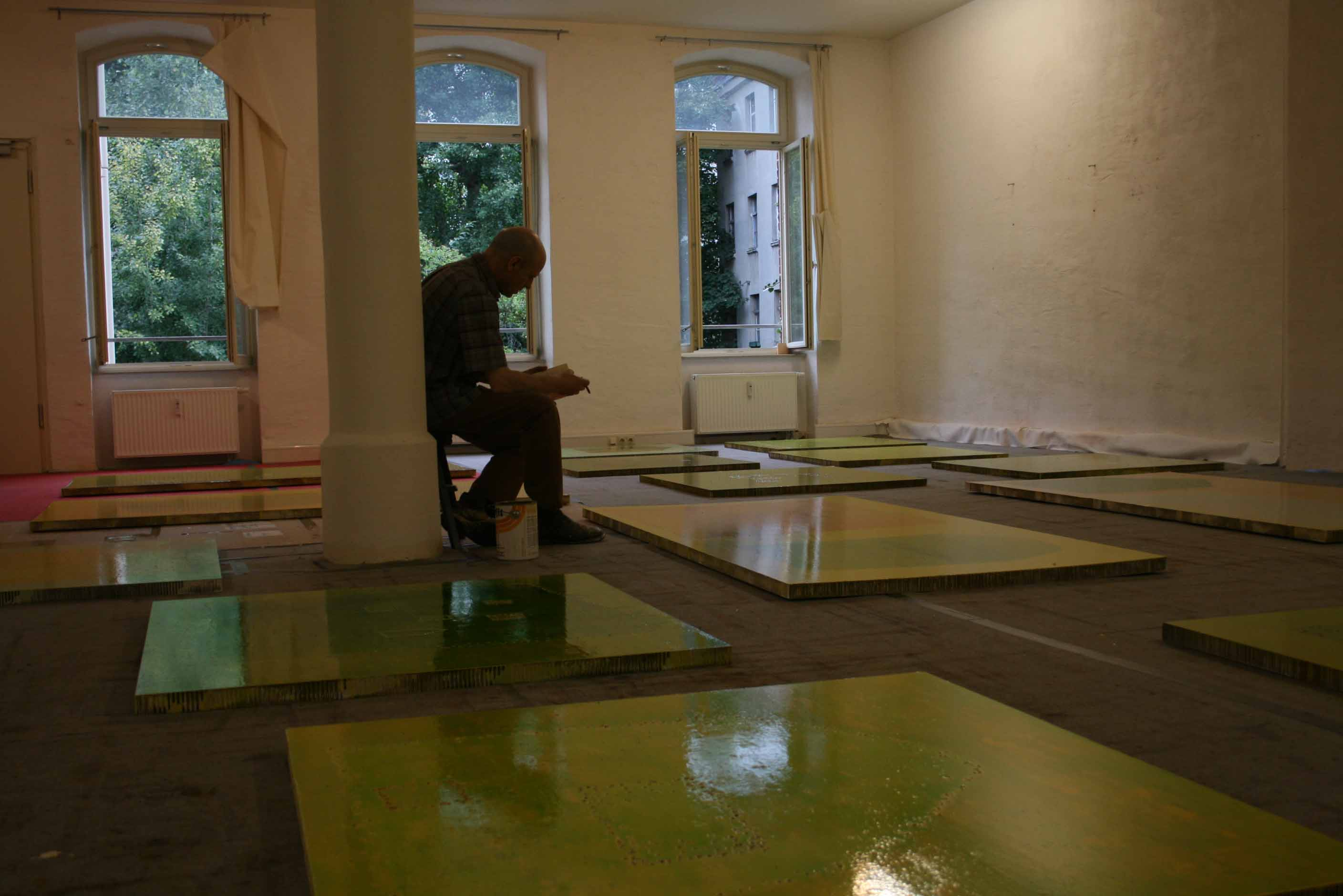 Lamazares leyendo en su taller berlinés